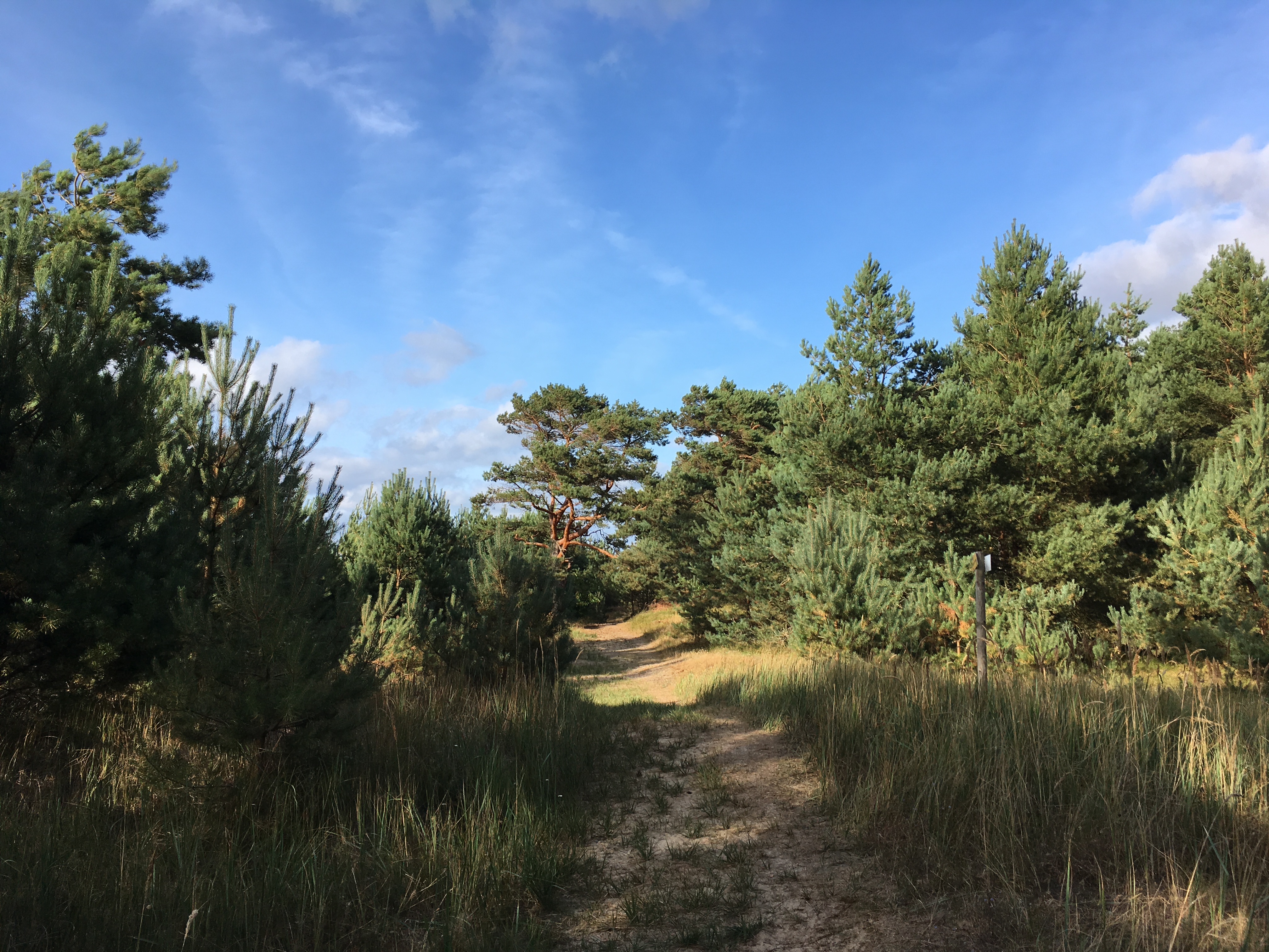 Die Lubminer Heide ist ein Waldgebiet bei Lubmin, einer Gemeinde im Landkreis Vorpommern-Greifswald im Land Mecklenburg-Vorpommern.